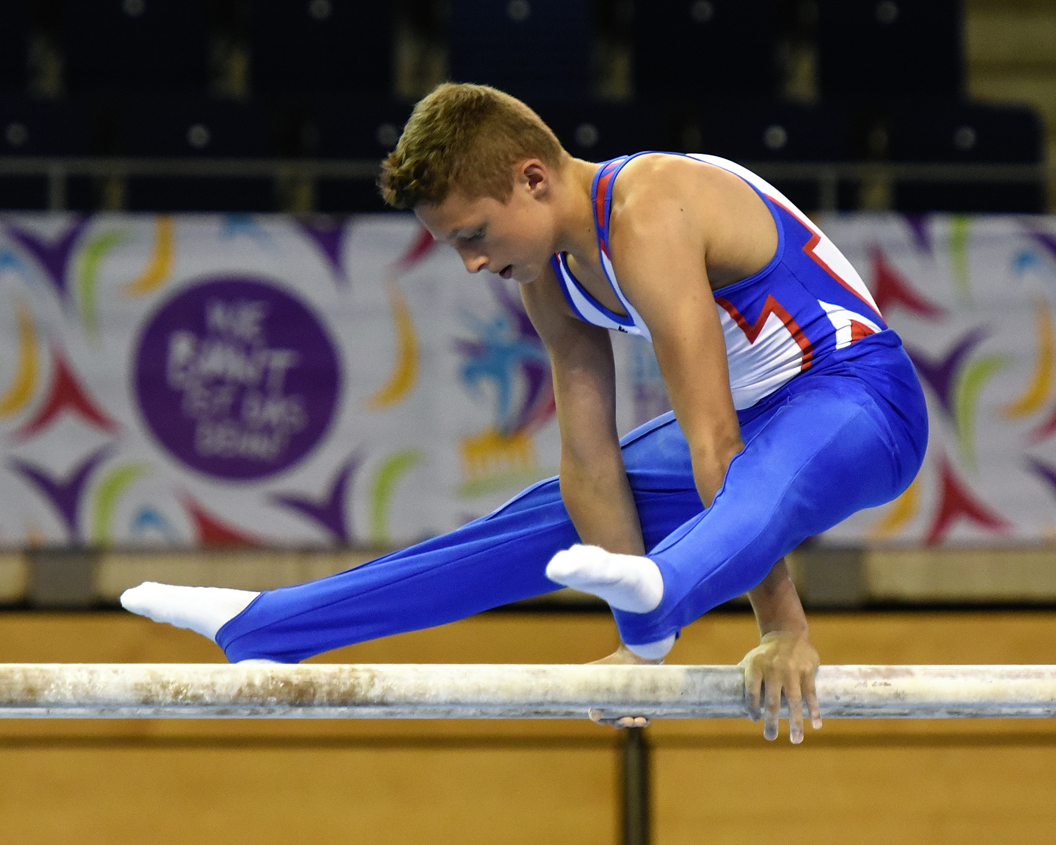 Deutsche Jugendmeisterschaften Gerätturnen männlich AK 12 Einturnen Pflicht beim Internationalen Deutschen Turnfest Berlin 2017. Abgebildet: Lorenz Steckel.